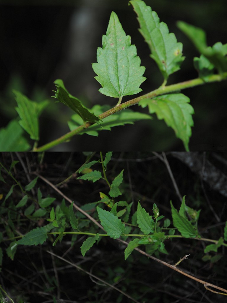 Baccharis anomala. Asteraceae. Fotos tomadas bajo bosque ribereño al margen del Gajo del Arroyo Tranqueras en Los Rodríguez, departamento de Tacuarembó, Uruguay.